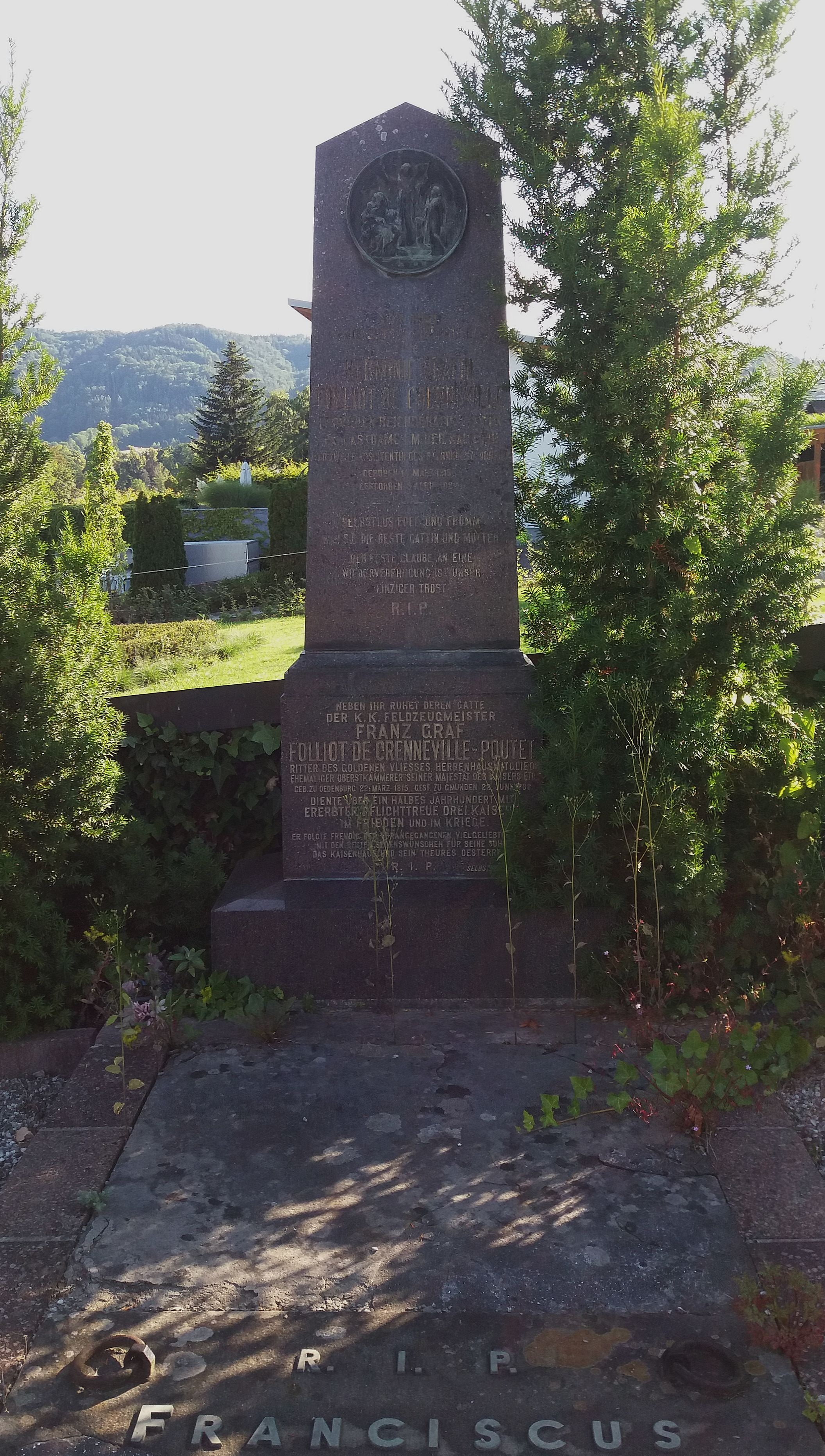 Friedhof Altmünster - Grab der gräflichen Familie "Folliot de Crenneville-Poutet"